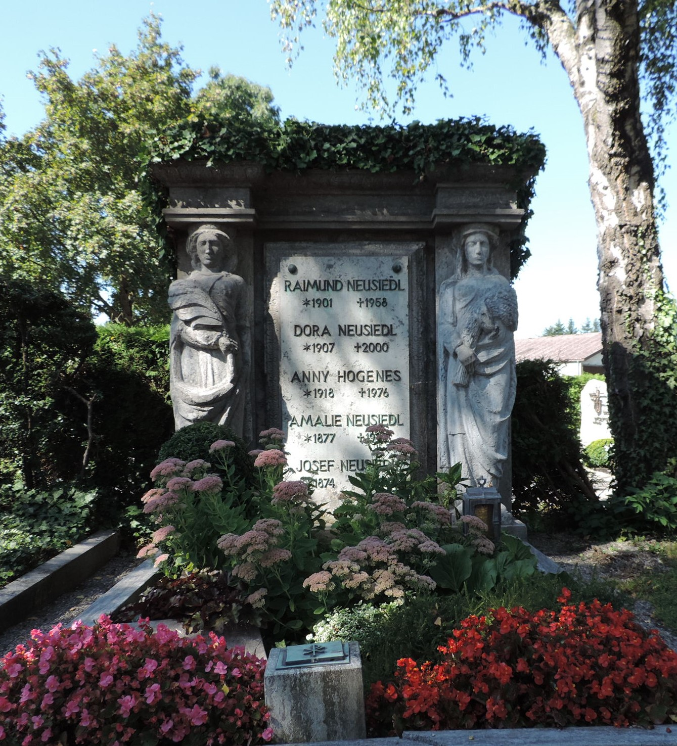 Alter Ostfriedhof Augsburg